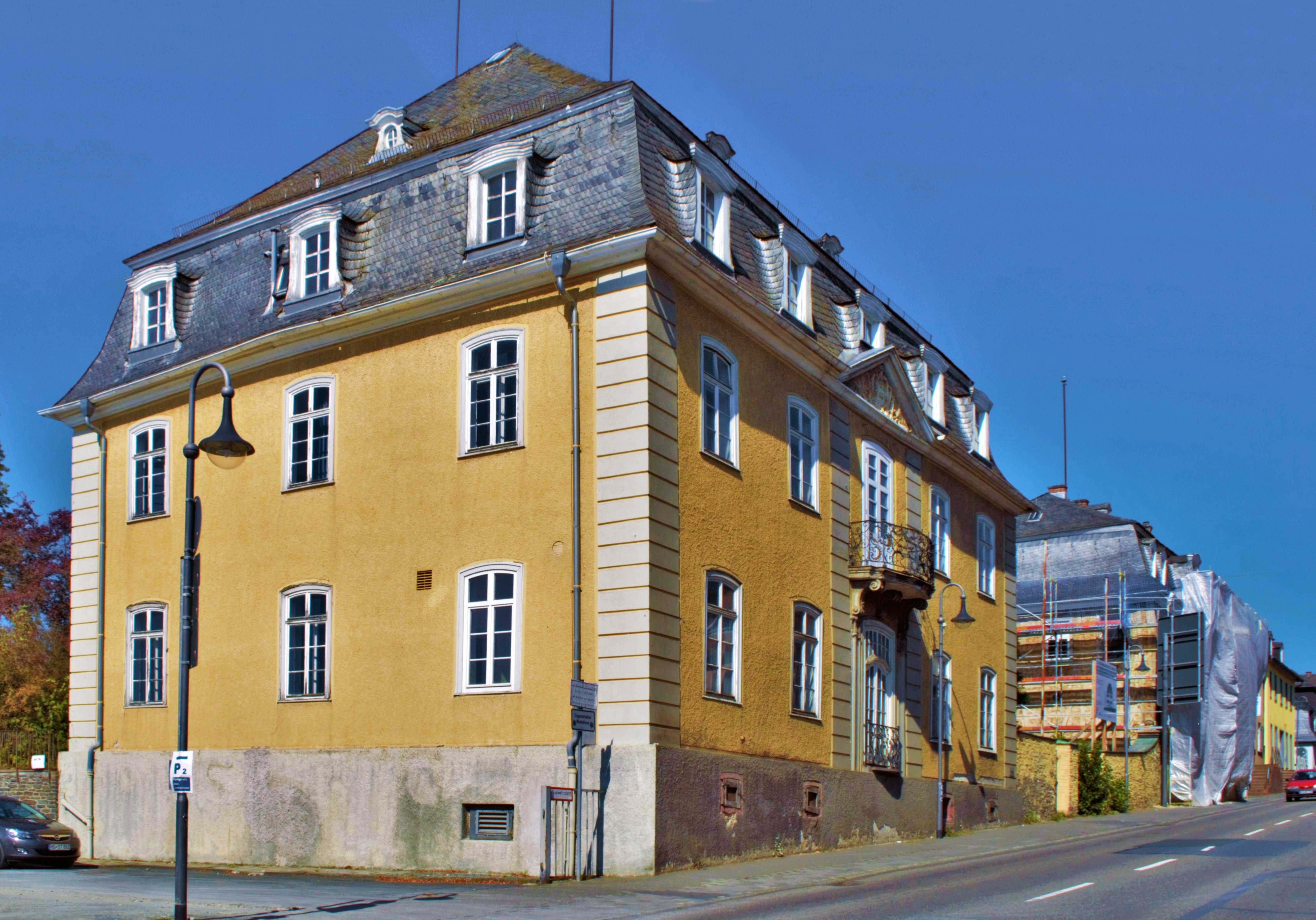 Blick entlang der Obergasse von Usingen stadtauswärts, linke Bildseite Prinzenpalais (Obergasse 23) mit einer Straßenmauer mit dem sogenannten Beamtenhaus (Obergasse 25, rechte Bildseite, in Sanierung) verbunden